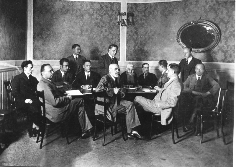 Rückseitig genannt: Johann Robert Hörbiger (sitzend, hinten Mitte rechts), Engelbert Pigal (sitzend, hinten links der Mitte), Hanns Hörbiger (stehend, Mitte links), Franz Houdek, Jung, E. Moss, Leopold Eckel, E. Darnhofer, Alois Deminger, Edgar von Wahl (sitzend, vorne Mitte)